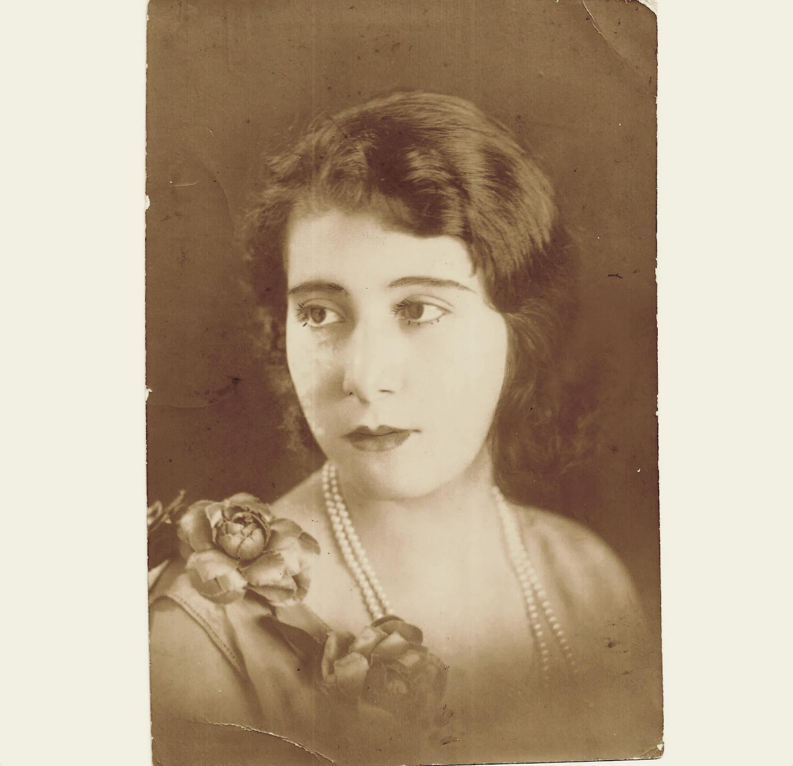 Argentina Díaz Lozano, 1932